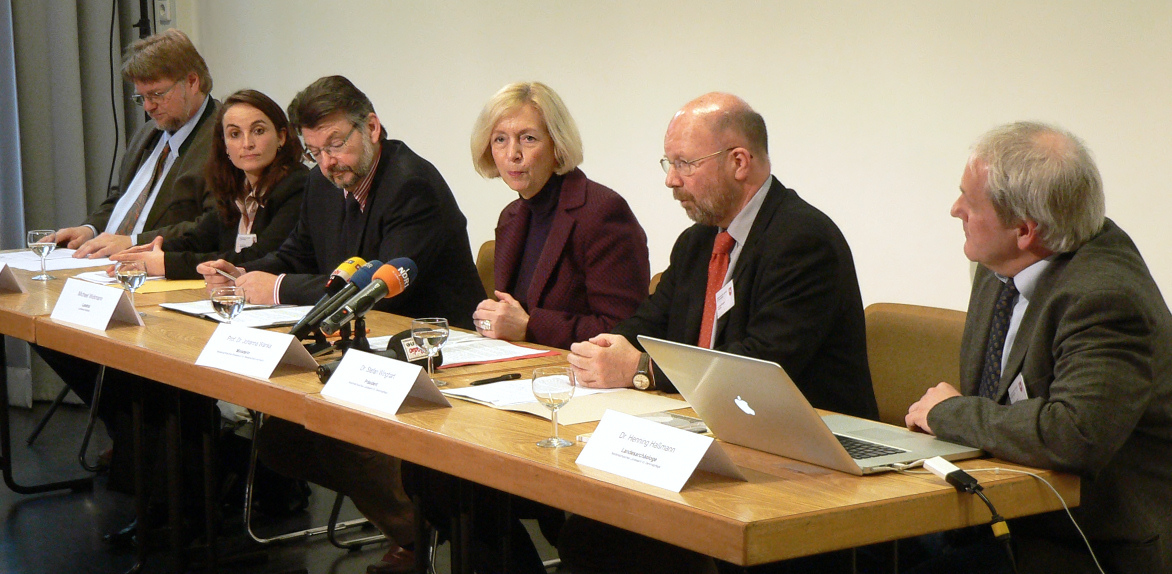 Harzhorn Pressekonferenz 11. Januar 2012 im Niedersächsischen Landesamt für Denkmalpflege. Von links nach rechts: Günther Moosbauer, Petra Lönne (Kreisarchäologin Northeim), Michael Wickmann (Landrat Landkreis Northeim), Wissenschaftsministerin Johanna Wanka, NLD-Leiter Stefan Winghart, Landesarchäologe Niedersachsen Henning Haßmann